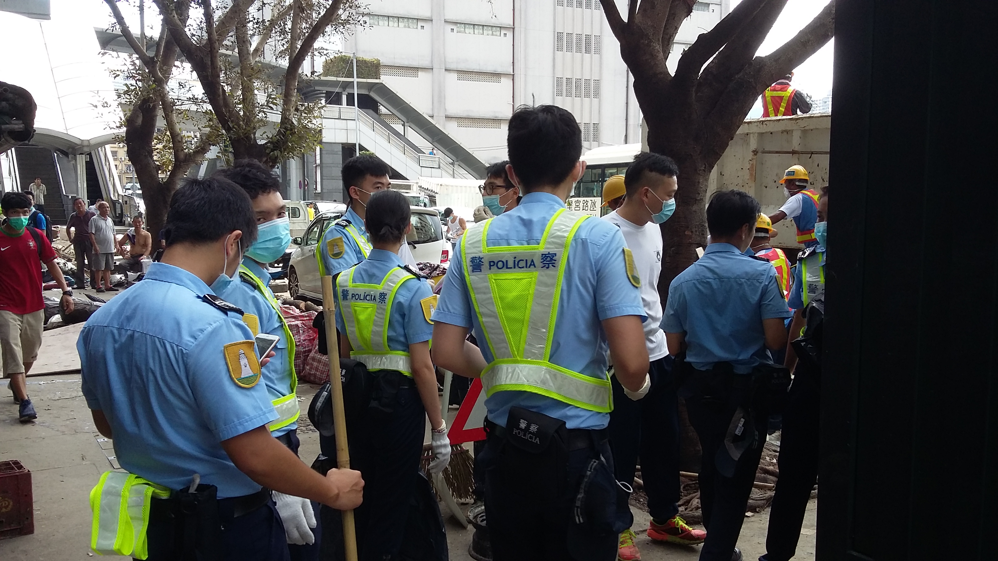 風暴過後第二日，風順堂區情況。